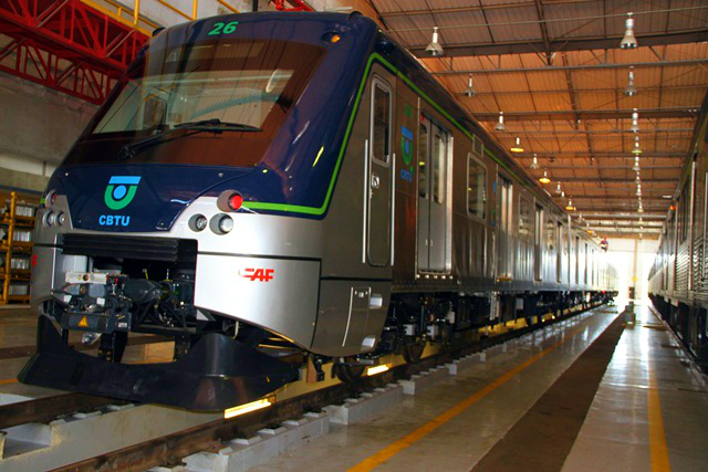 Trem da CBTU, no Metrô do Recife.